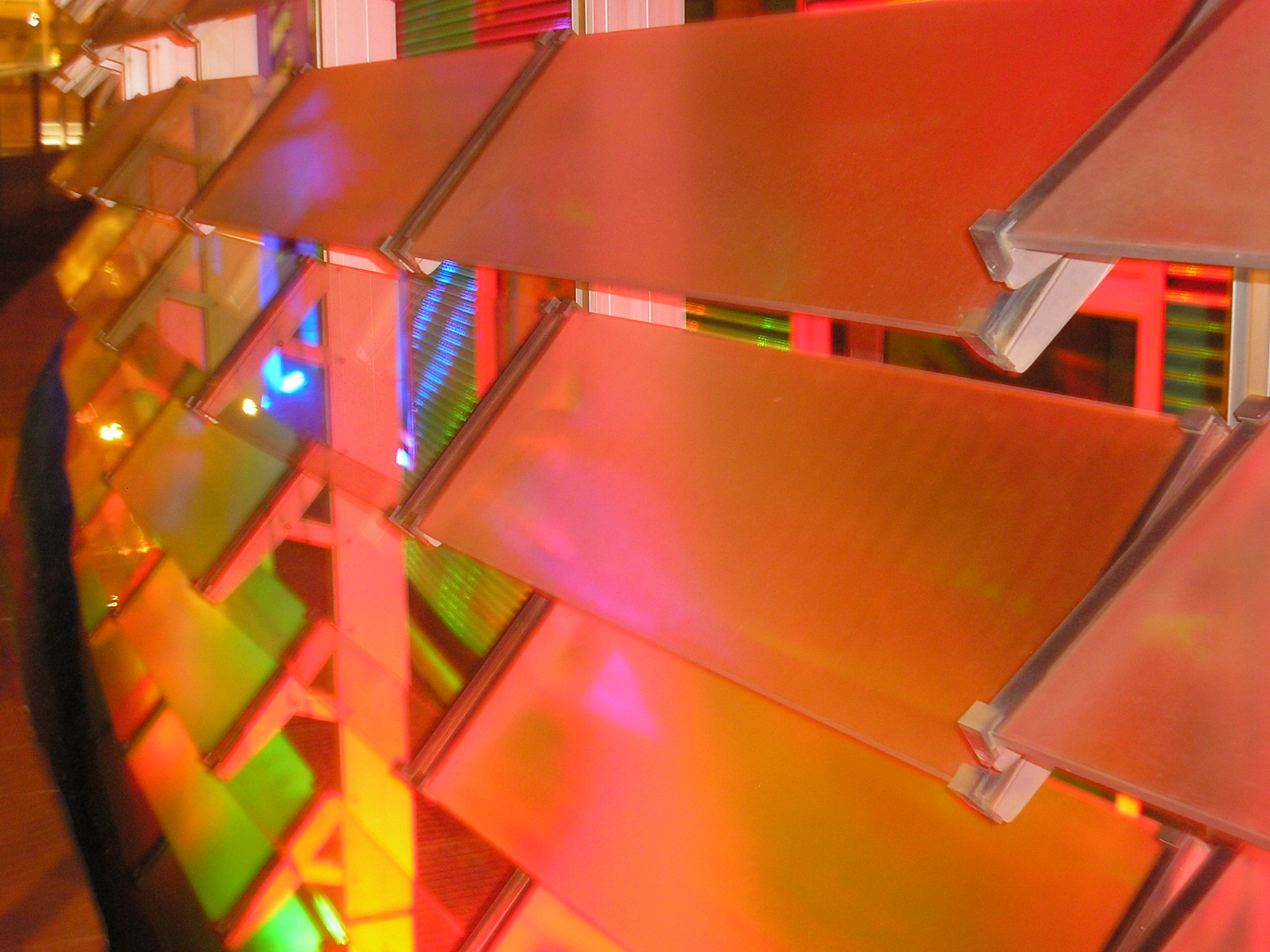 Detalle cristales torre Agbar Barcelona,España.